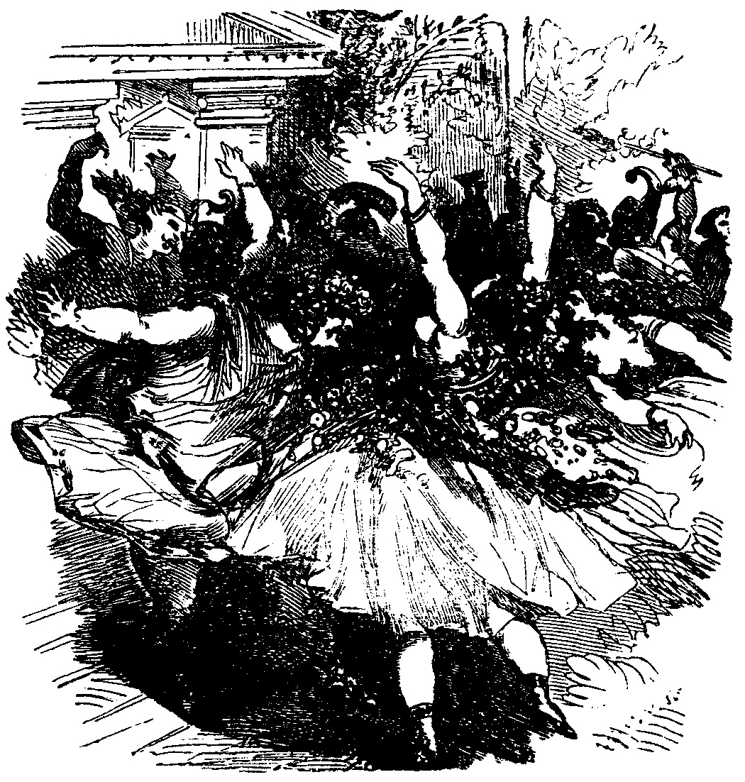 Les enfers - Orphée aux Enfers